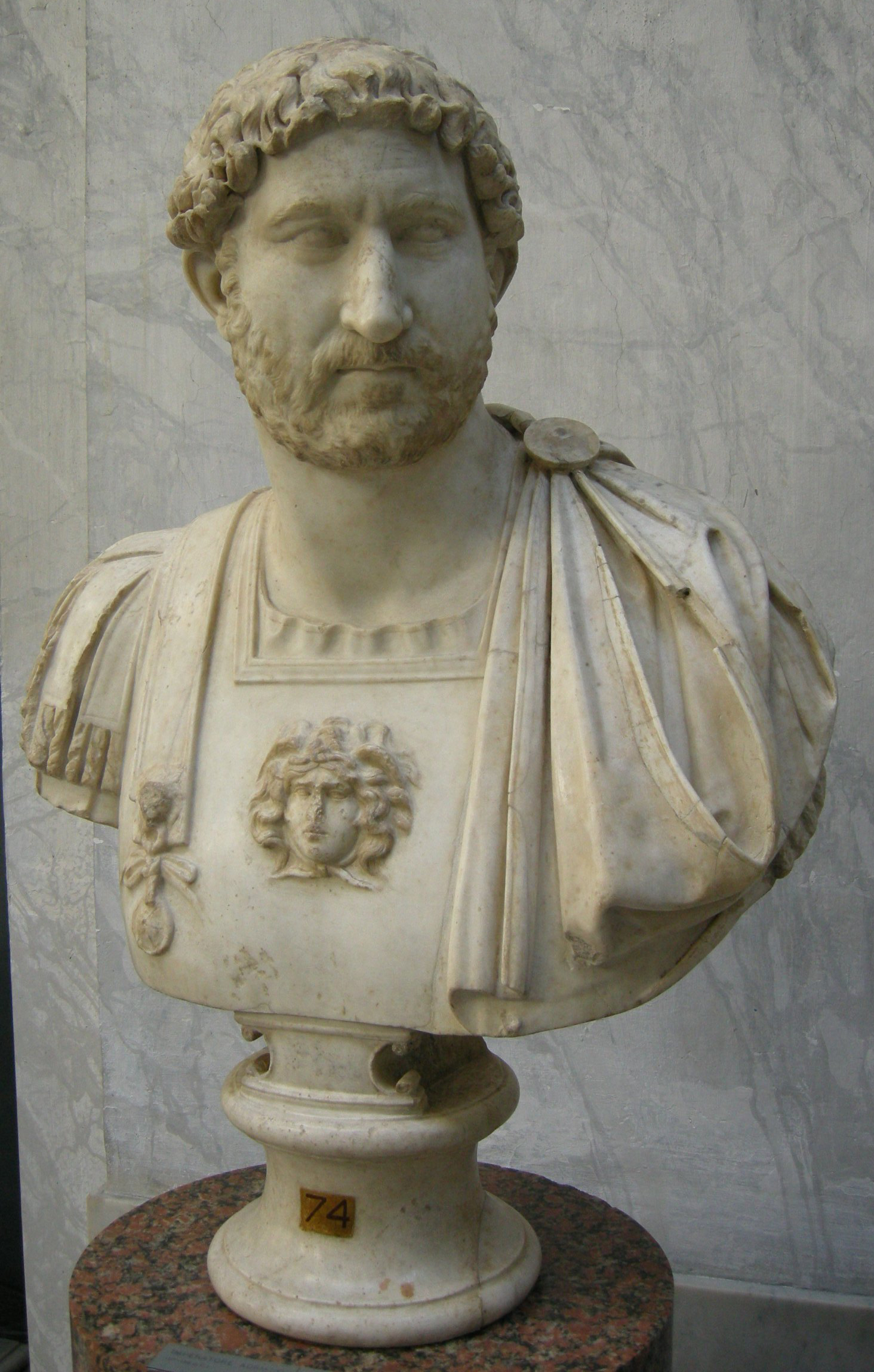 Busto di Adriano. Musei Vaticani, Museo Chiaramonti - Braccio Nuovo; inv. 2247.